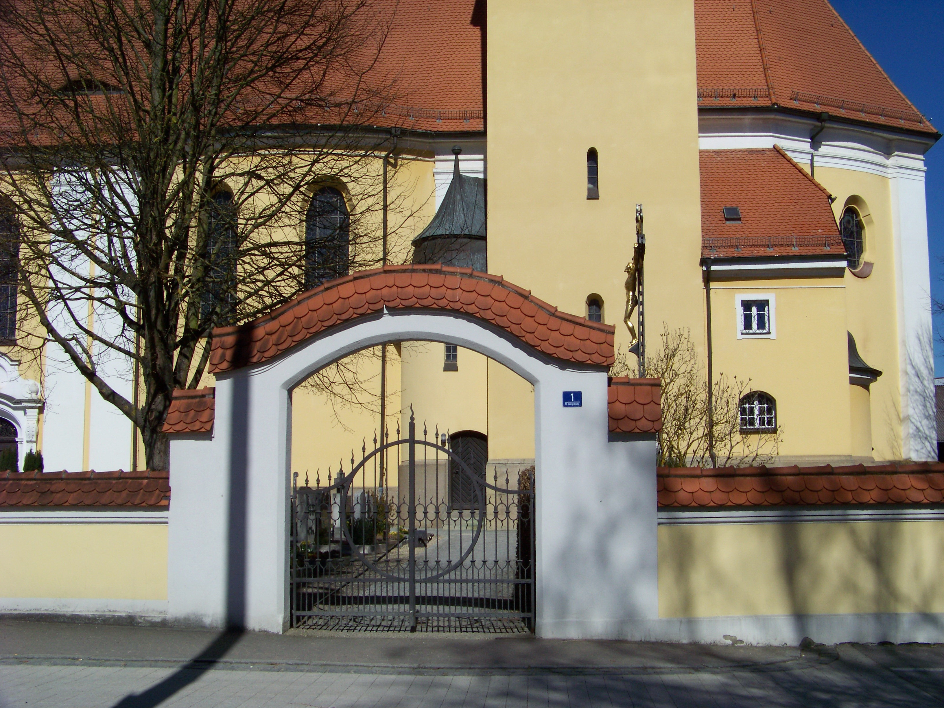 Obertraubling, Sankt-Georg-Straße 1. Kath. Pfarrkirche St. Georg. Saalbau mit eingezogenem Chor, Schweifgiebel, südlichem Chorflankenturm mit Haubendach und Putzgliederungen, neubarock, 1907-09. Friedhofmauer mit segmentbogigen Toren und Putzgliederungen, um 1910.